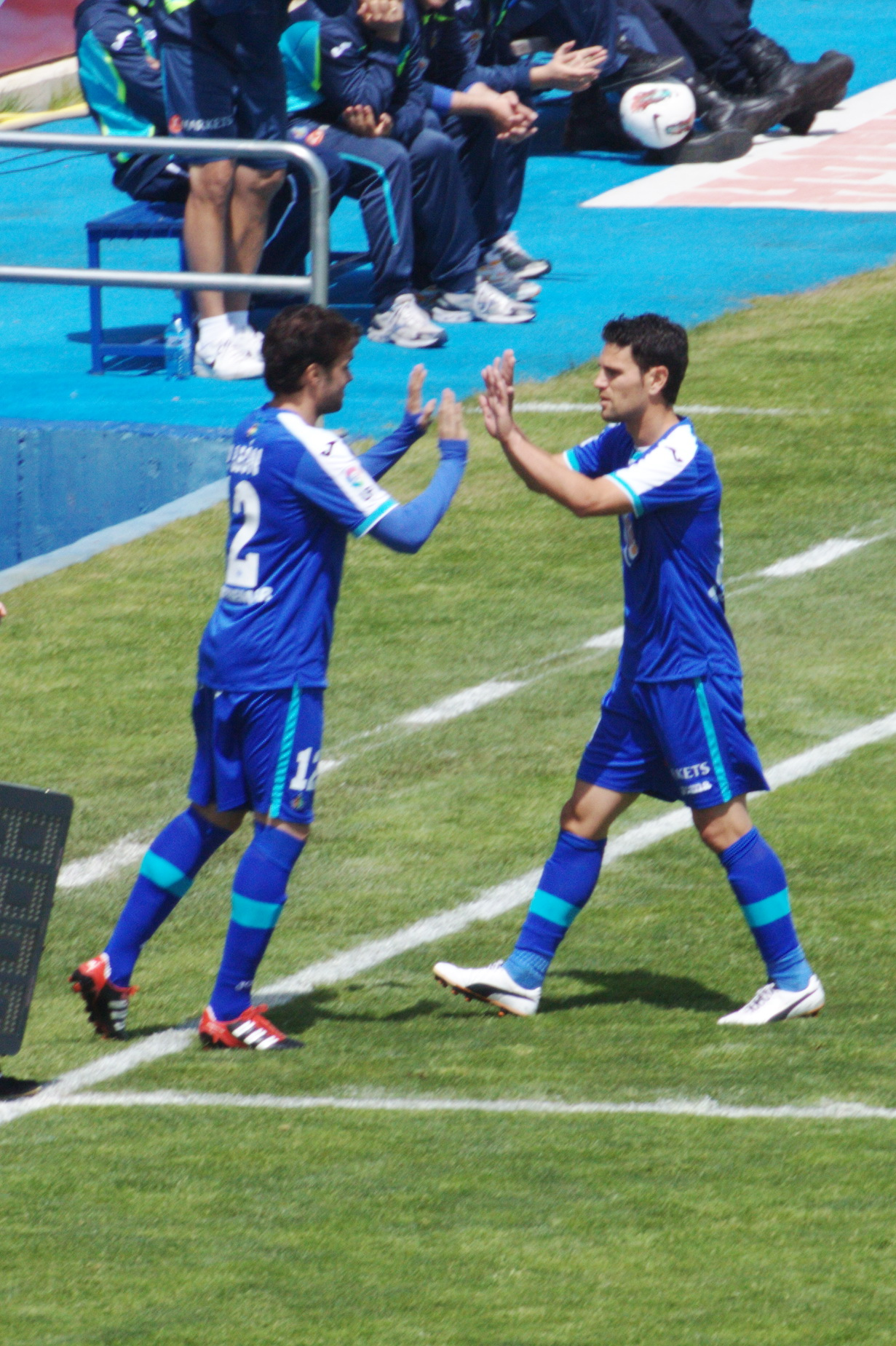 Jaime Gavilán Martínez (Valencia, Comunidad Valenciana, España, 12 de mayo de 1985) es un futbolista español. Juega de interior izquierdo en el Getafe CF. Cambio con el jugador Pedro León